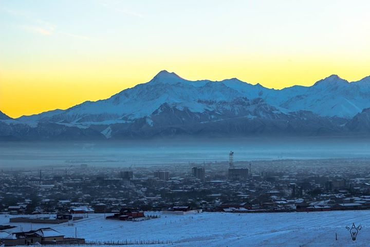 ГӀалгӀай: Баш-лоам фона тIа Нана-Наьсаре